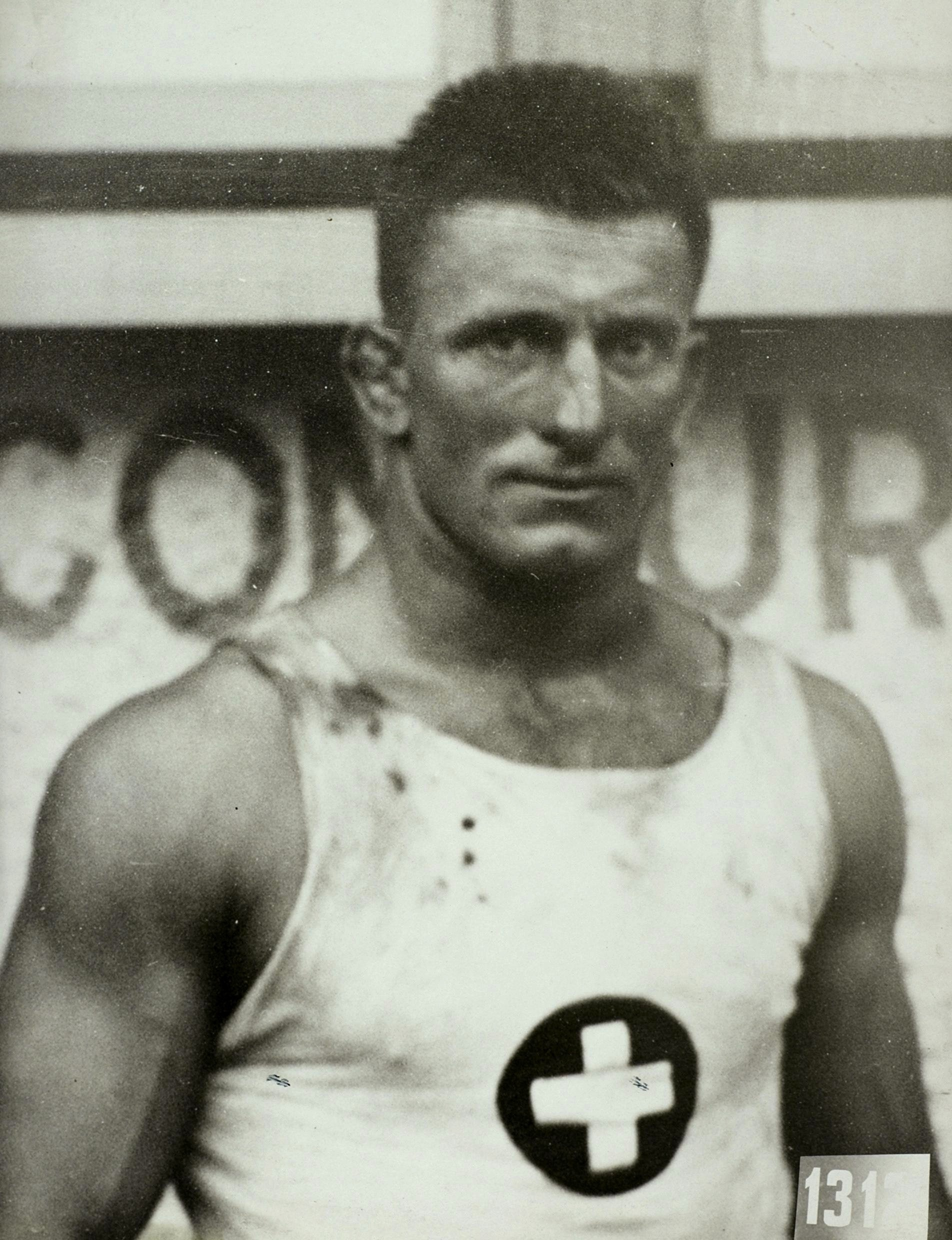 Sport. Sport, Olympische Spelen Amsterdam, 1928 : Olympisch kampioen worstelen vrije stijl tot 79 kg, de Zwitser Ernst Kyburz.